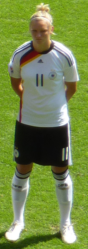 Alexandra Popp, deutsche Fußballspielerin, Bild wurde am 20. Juli 2010 in Augsburg aufgenommen.